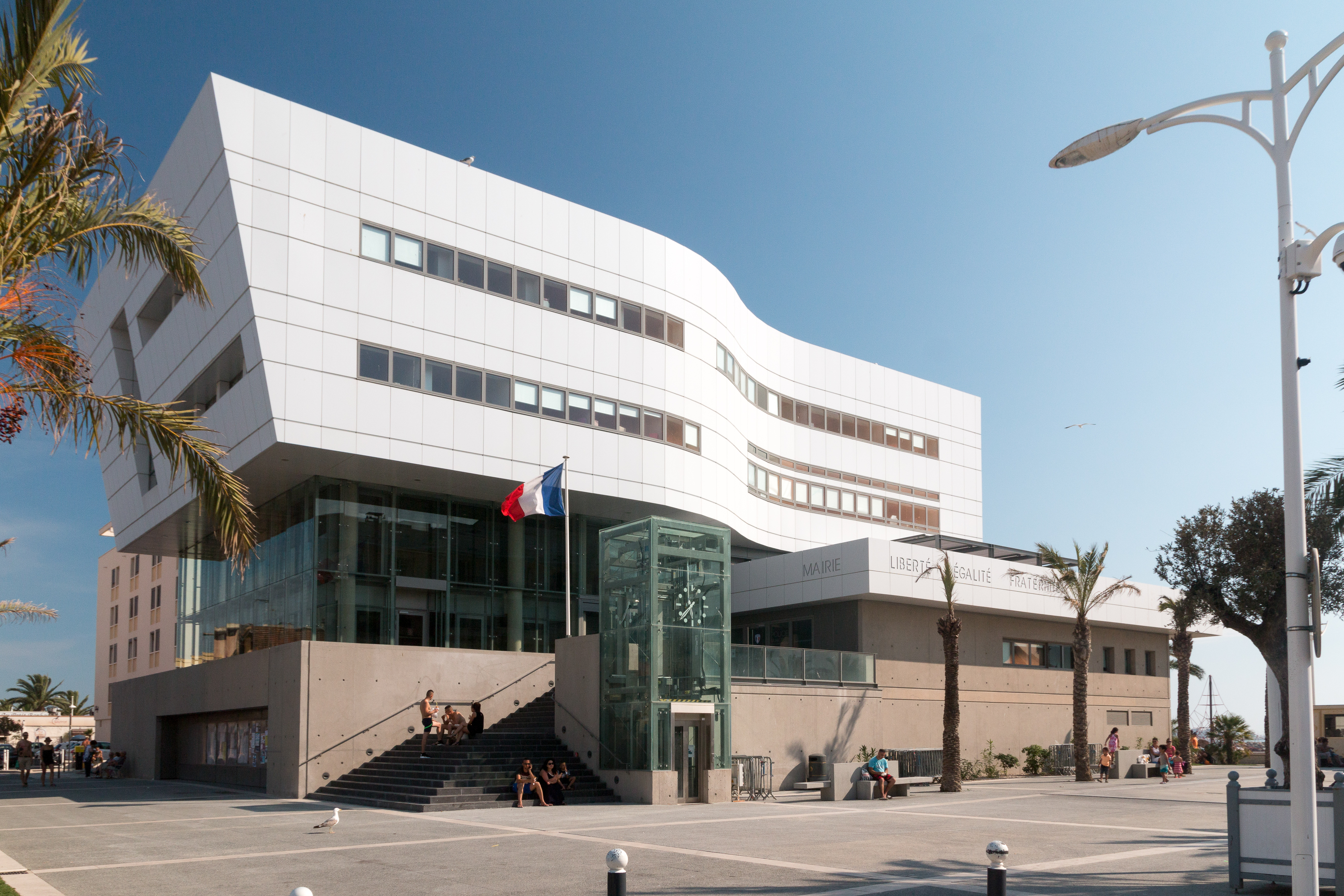 Le Grau-du-Roi (Gard) - Town Hall